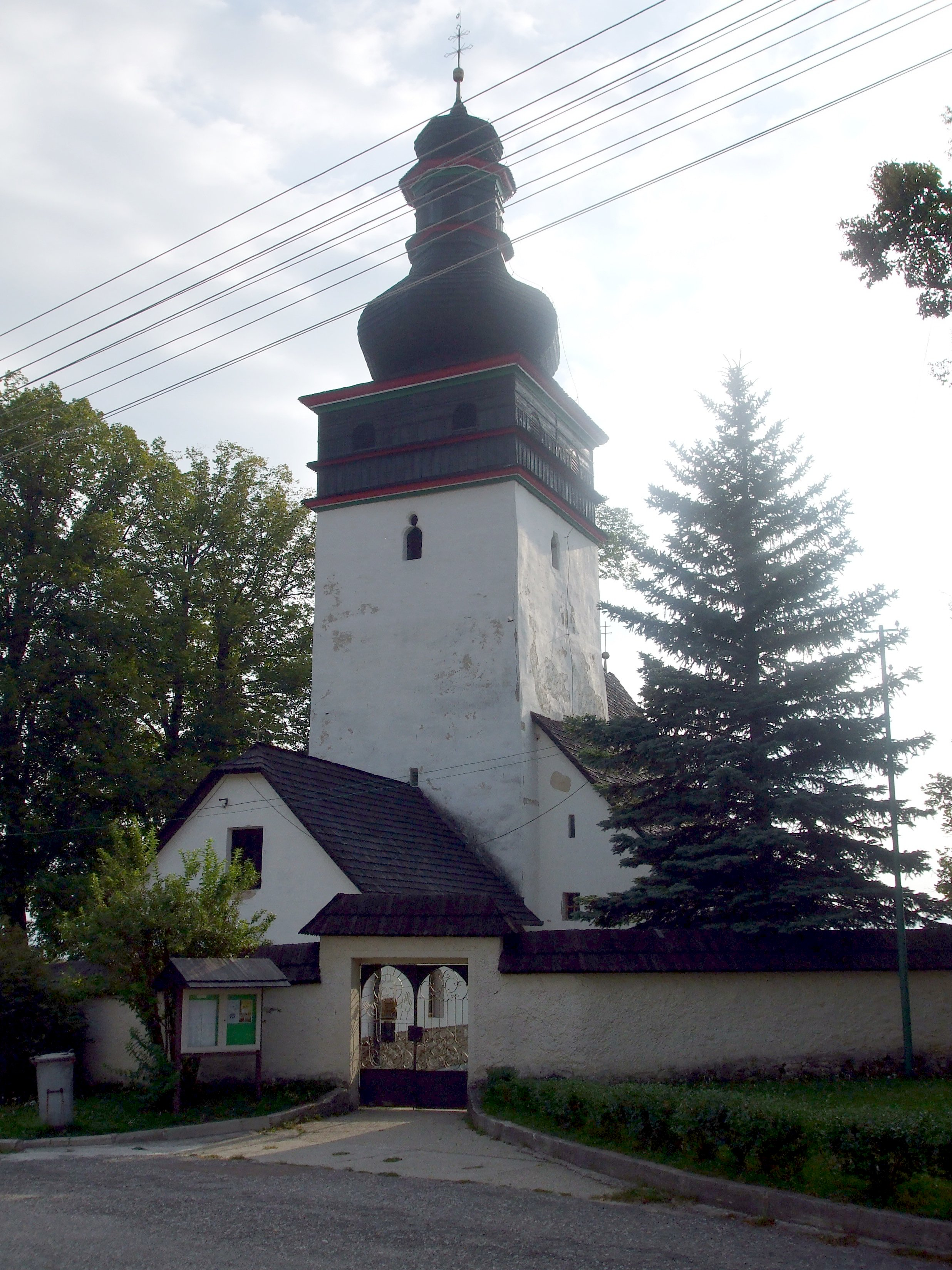 Church in Poruba, (probably) okres Prievidza, Slovakia